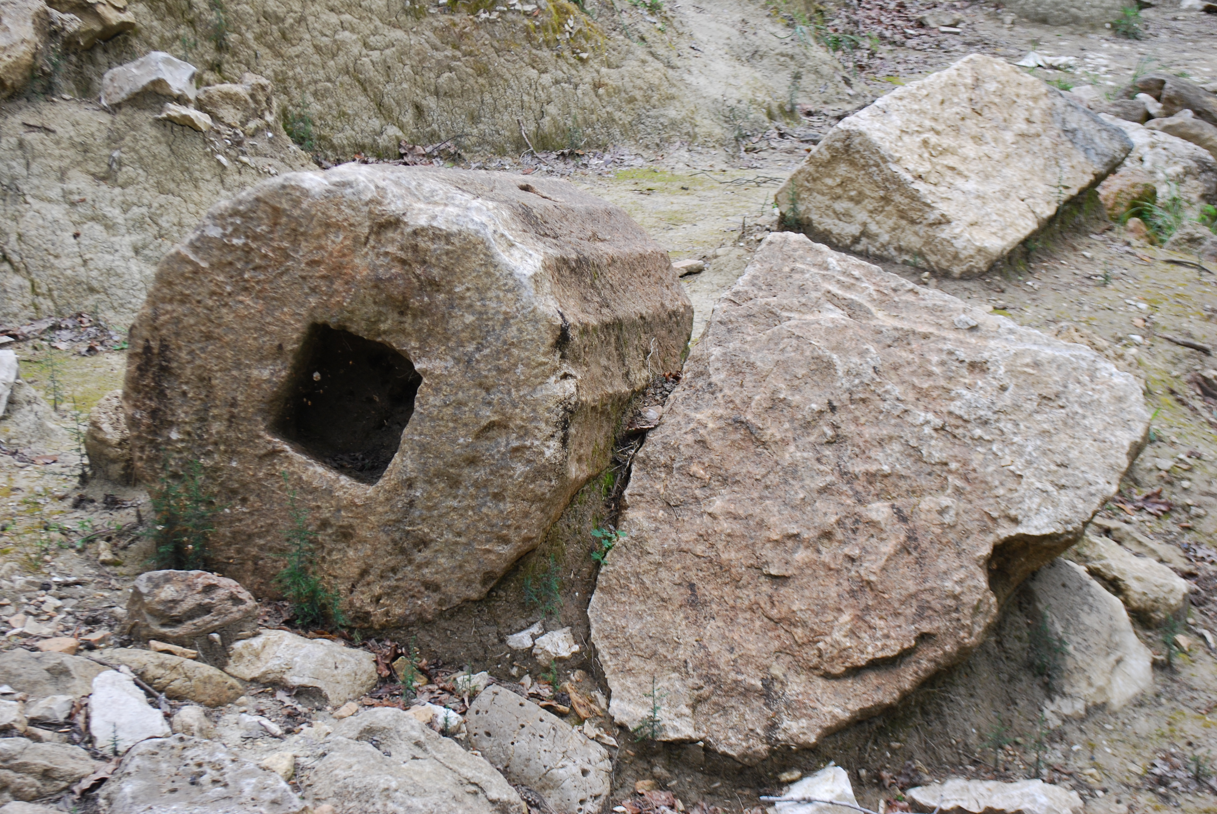 Vue du site archéologique de Paleopoli à Corfou.